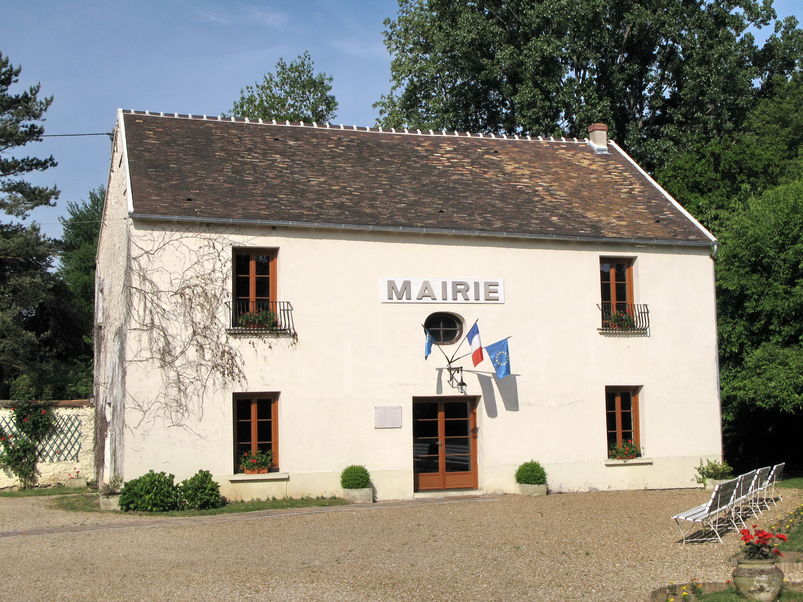 Mairie de Sermaise (Essonne, Île-de-France, France).